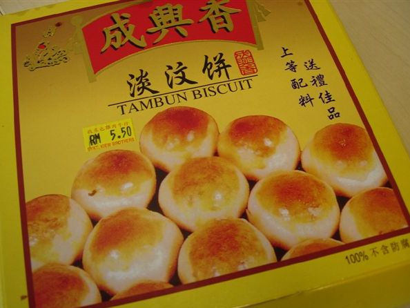 Tambun Biscuit